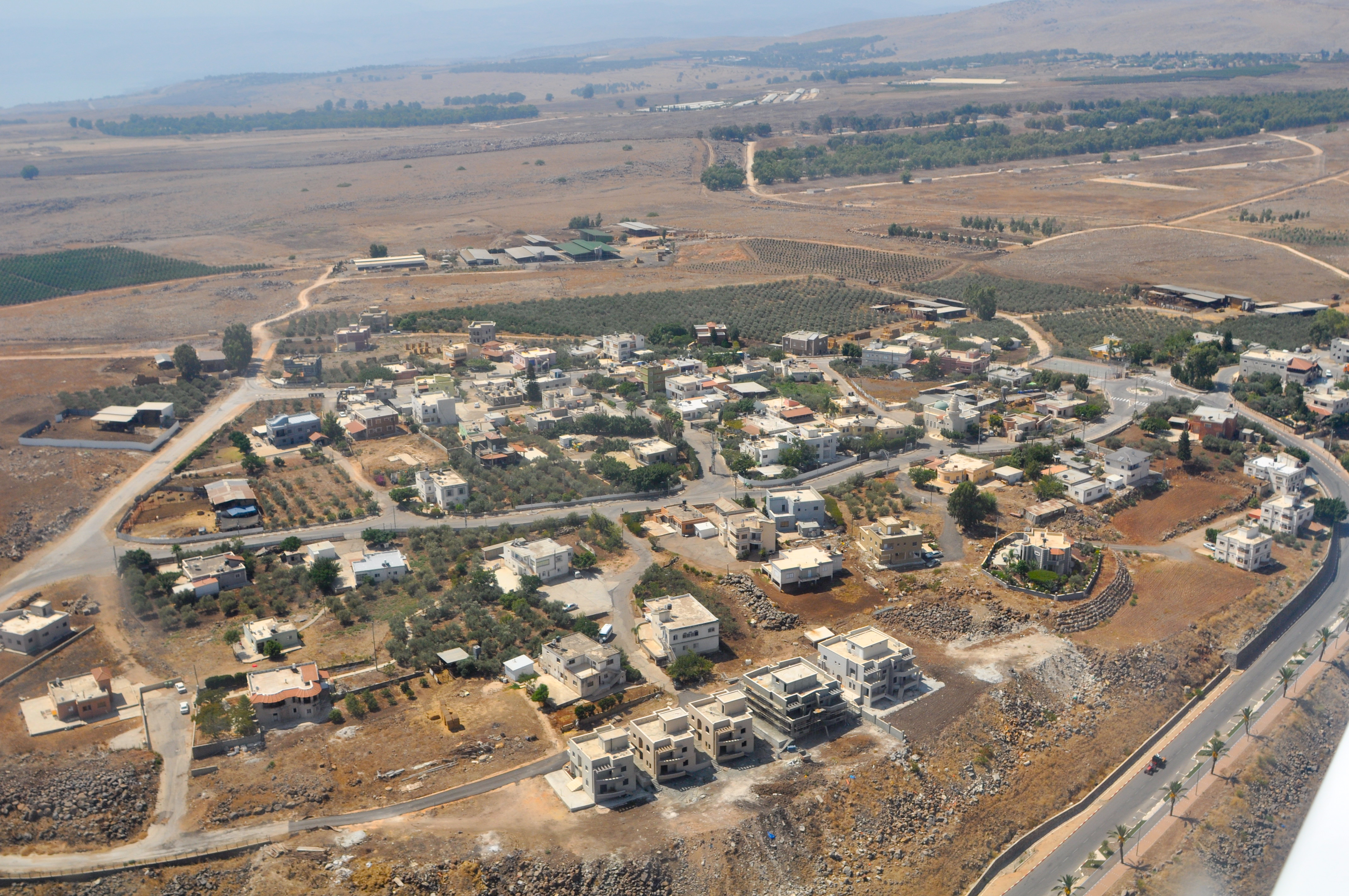 טובא-זנגרייה